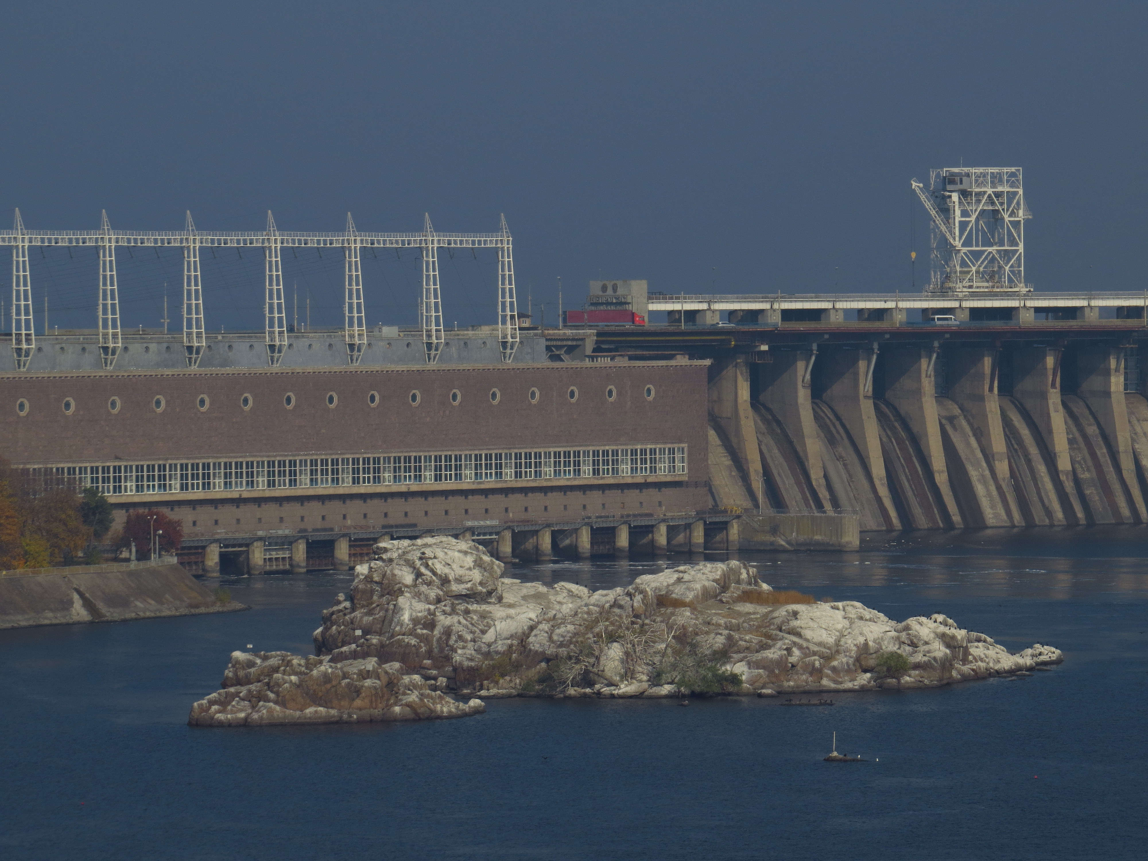 «Дніпровські пороги», м. Запоріжжя, о. Хортиця, о. Байда та скелі посеред р. Дніпро